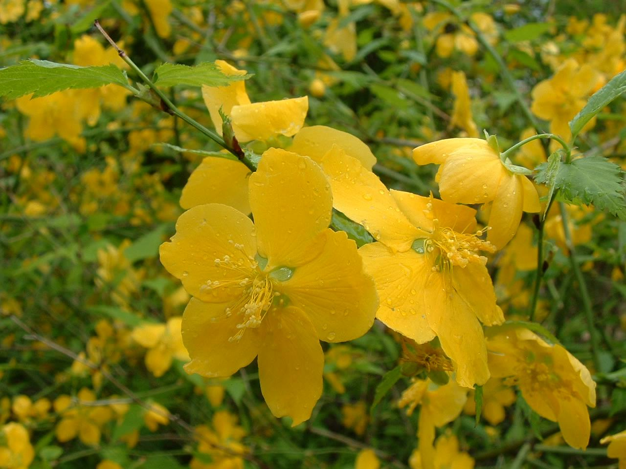 Kerria japonica, jardin botanique de Lyon France